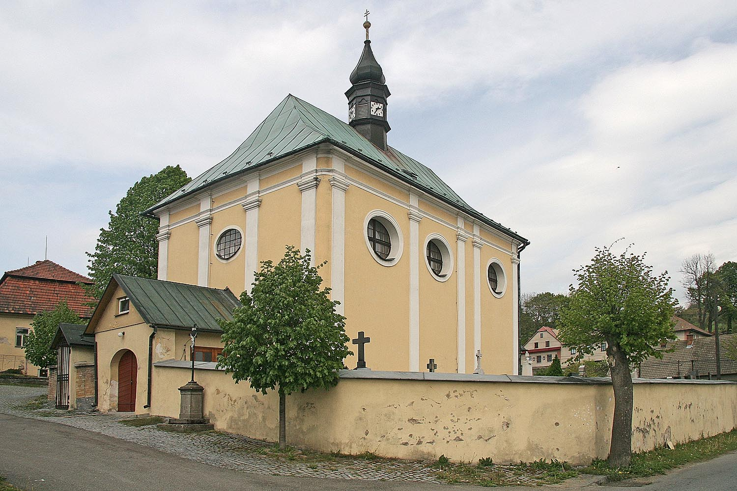 Sulkovec - kostel svatého Havla, district Žďár nad Sázavou